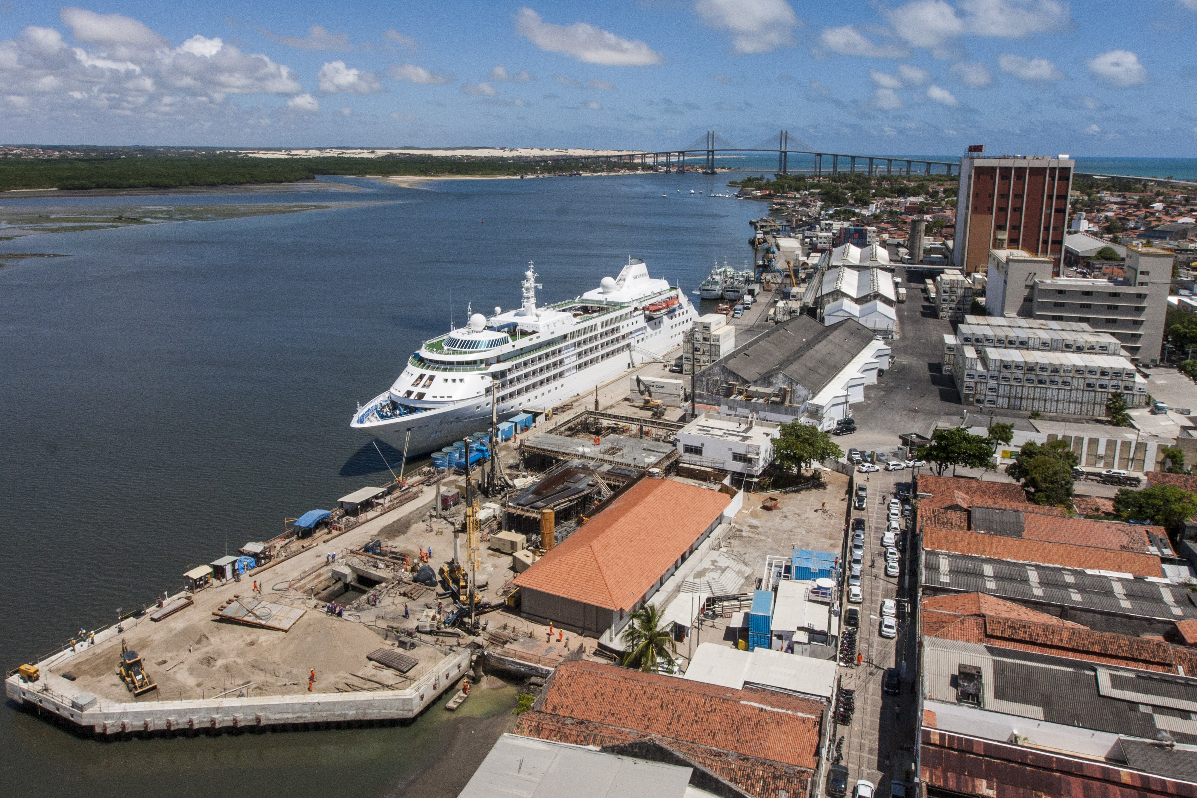 Porto de Natal, em Natal, RN, Brasil.